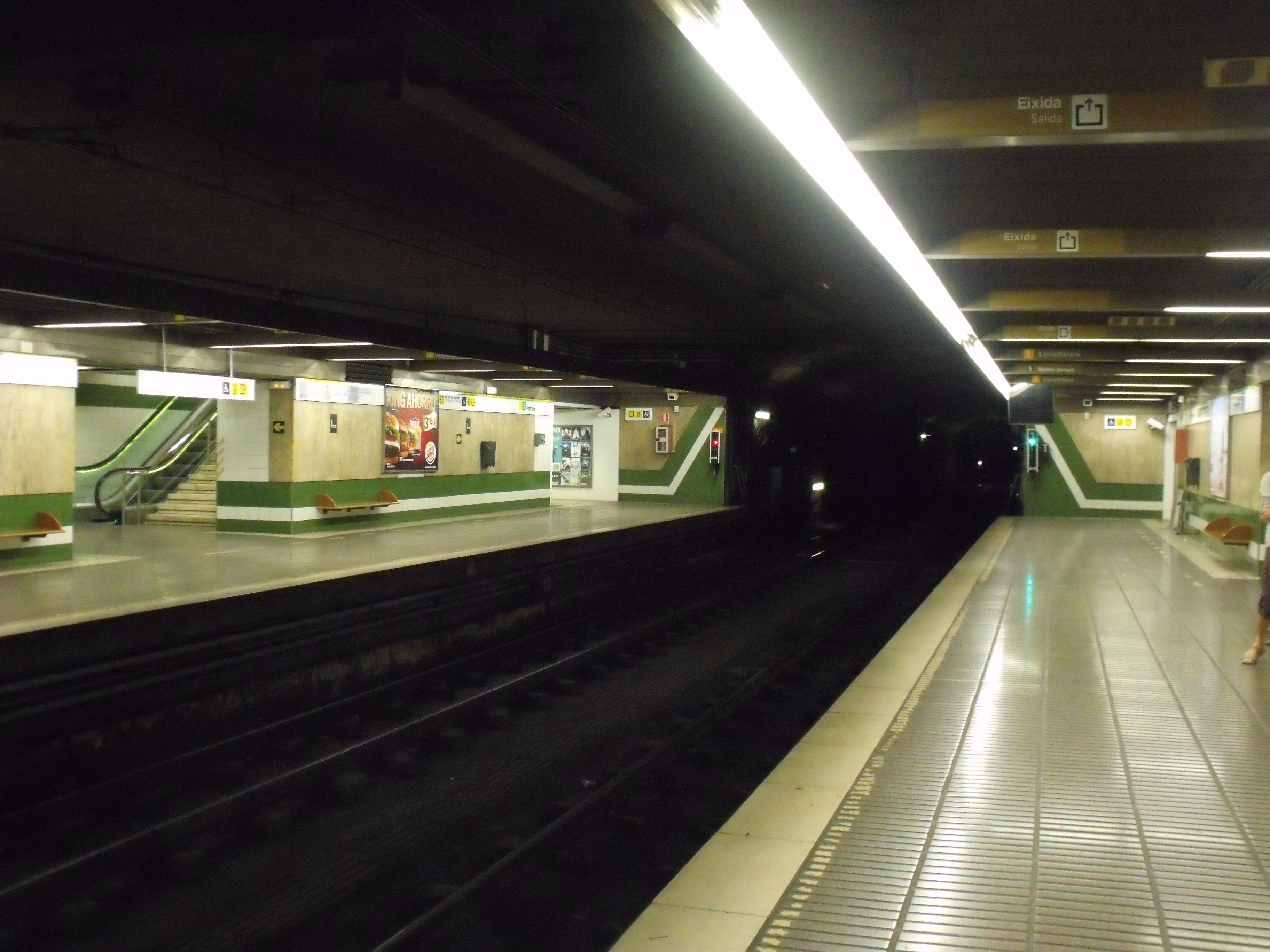 Estación de metro de Patraix, mirando hacia el norte.